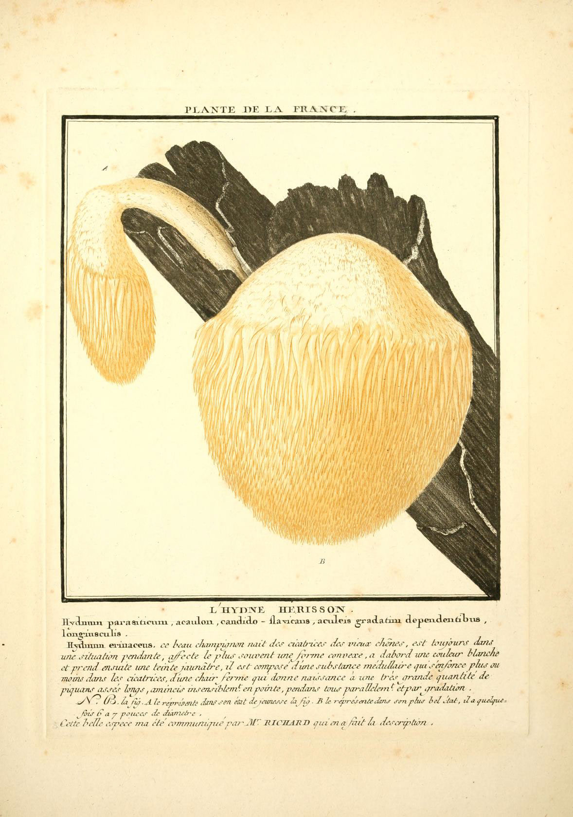 PILANTE DE LA FRA.XCI: Hv^laTïm pai-aaitictun , acaulon ,oaiidx.lo - ilavicans , aciileis ^radatau. tlejjendentibws , lonçatiBciilis . T^ne j'iâiaâim Vfndin/ï , ii/fccte le pluj- o'ouvenf une^/v?ync coni^âxe ,a dabcn-d ime cmileitr bl4mcfw et Tyt~end en^wte lau temte Munàâ-e, i7 ai-A e/rmpûje Jûm ^uésùznce rm'JïiÛiicre qui ^c'en/mce pauf ûu 7 7 , r / / 7 _ . -. -, / . \de quanUre de yraiLitùm . T^^m'eJ'^^ tJtUti*' ^i'^t nui tic fcufU-^'fC lu fiy- -tt te ' «^' cv. «»(«- «o^ff vtfit ^■iu.- Oel t.ttlC, tl tZ i^tieùp^= Cette heâe e.j'eee ma éte'eemmunùpie paj^ Jif. HICSAUD ijia' ma /riiï h dvcr^tiûn .